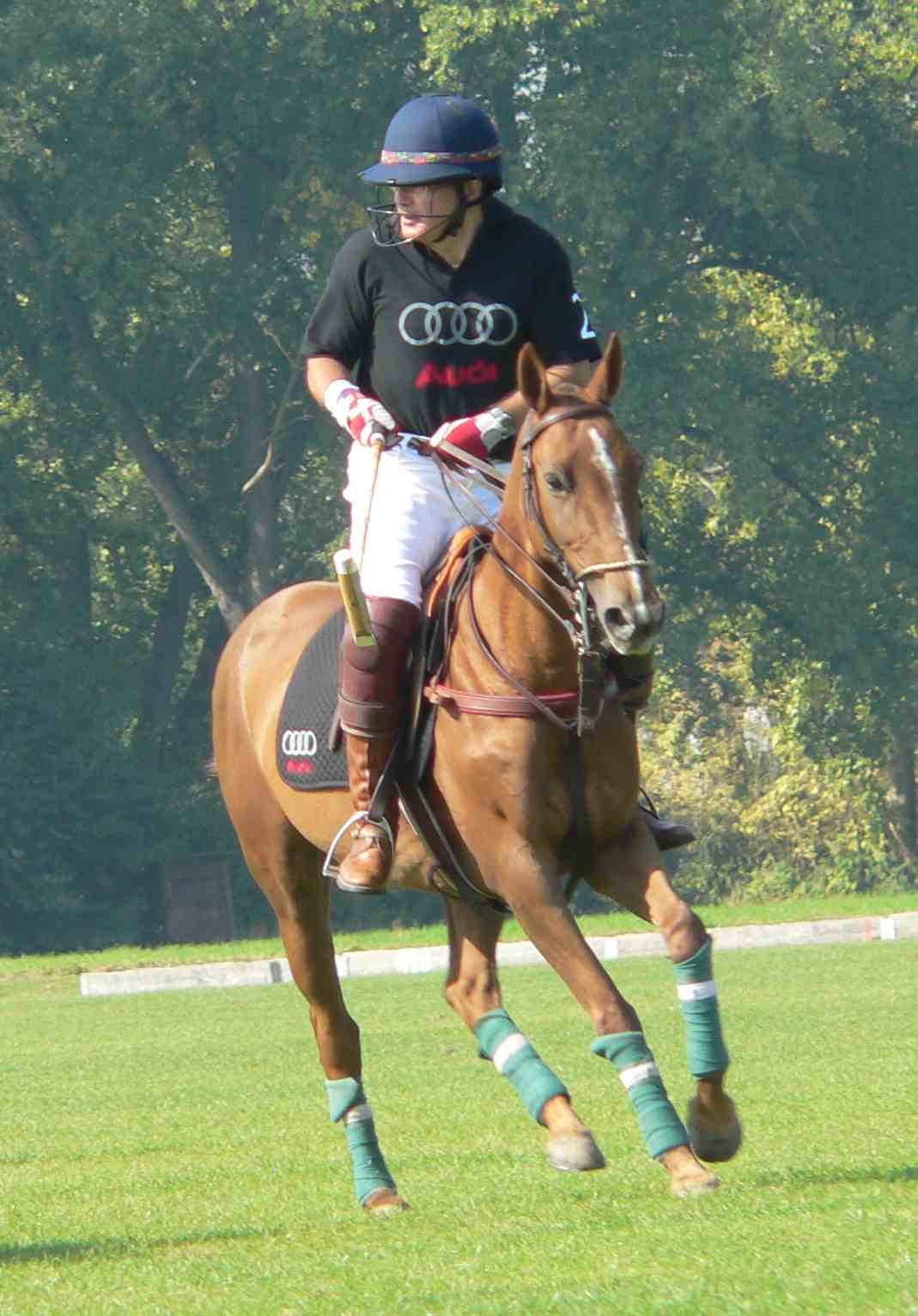 Polo